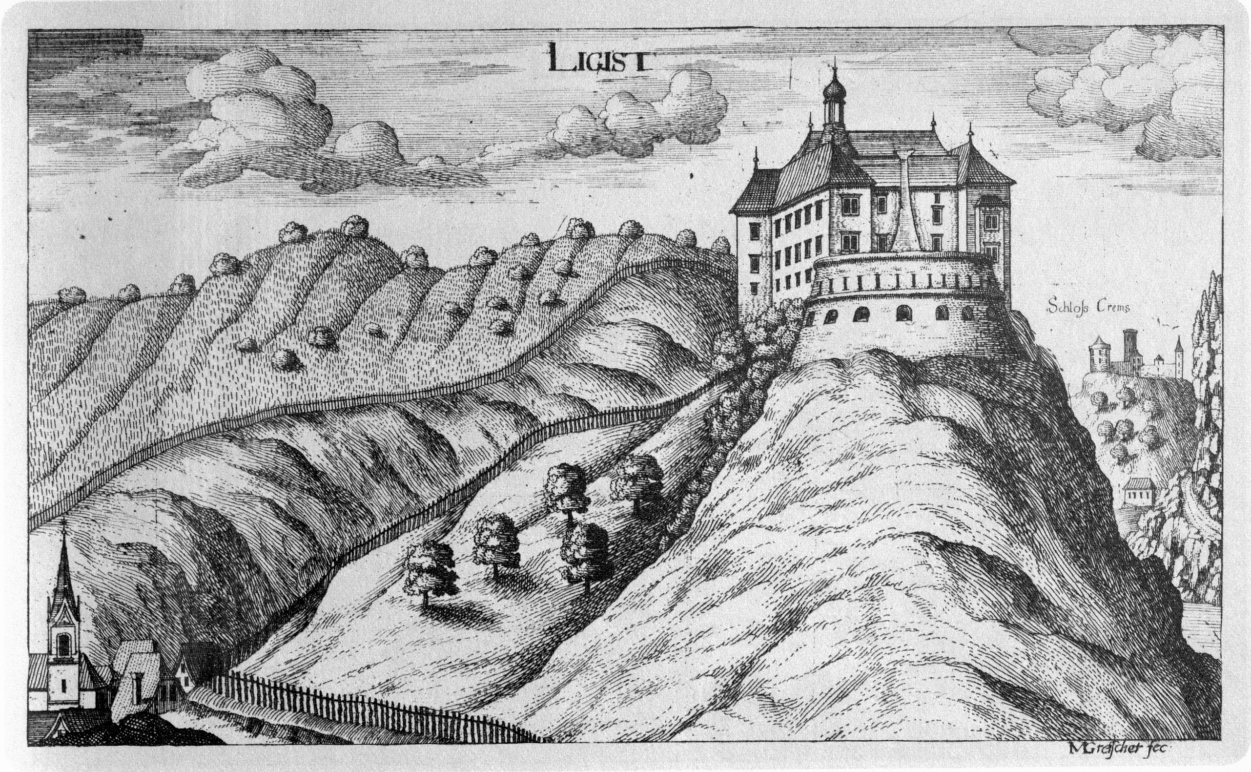 G. M. Vischers Käyserlichen Geographi, Topographia Ducatus Stiriae, Das ist: Eigentliche Delineation / und Abbildung aller Städte / Schlösser / Marcktfleck / Lustgärten / Probsteyen / Stiffter / Clöster und Kirchen / so es sich im Herzogthumb Steyrmarck befinden; Und anjetzo Umb einen billichen Preyß zu finden seynd Bey Johann Bitsch Universitäts Buchhandlern / Auff dem Juden=Platz bey der guldenen Saulen. Graz 1681 Die Nummerierung der Dateien folgt der alphabetischen Reihung der Ortsnamen